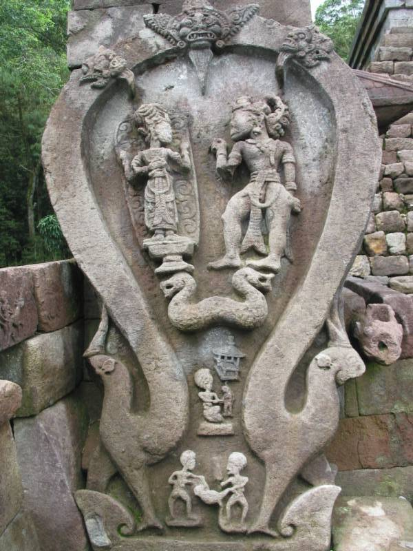 Candi Sukuh